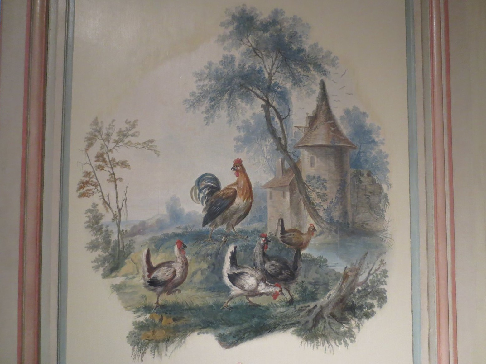 Scène peinte d'après la fable de Jean de La Fontaine.